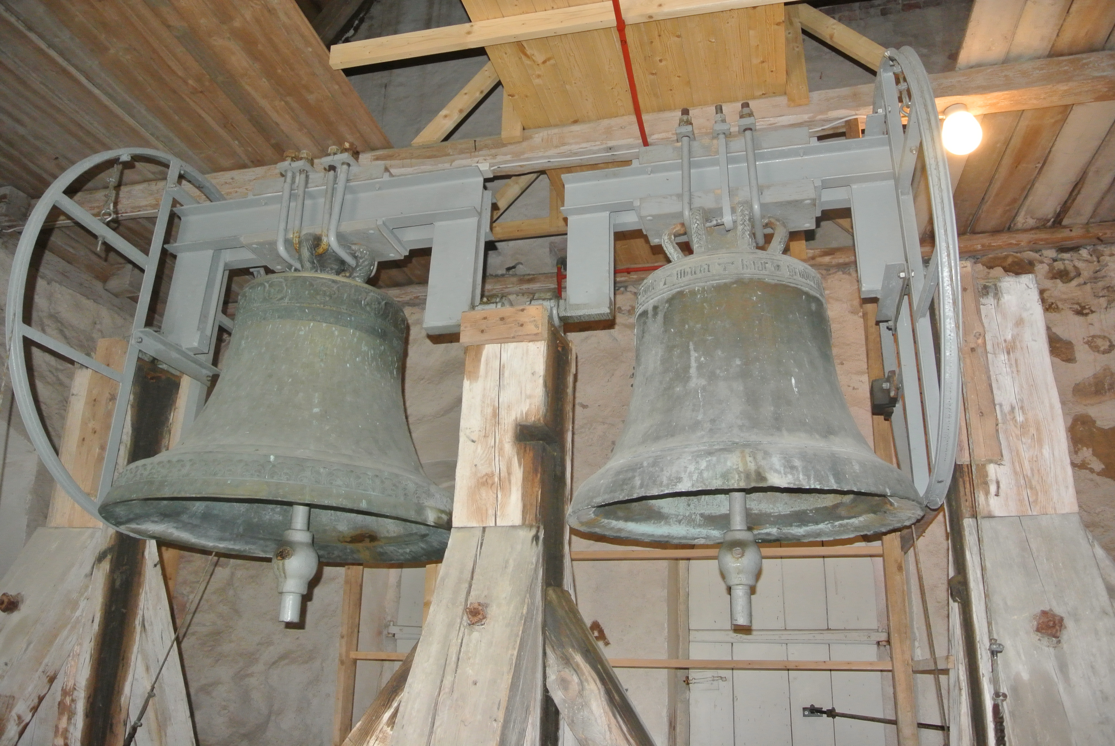 KLockorna i Västra Torups kyrka. Storklockan från 1910 till vänster och lillklockan från 1493 till höger